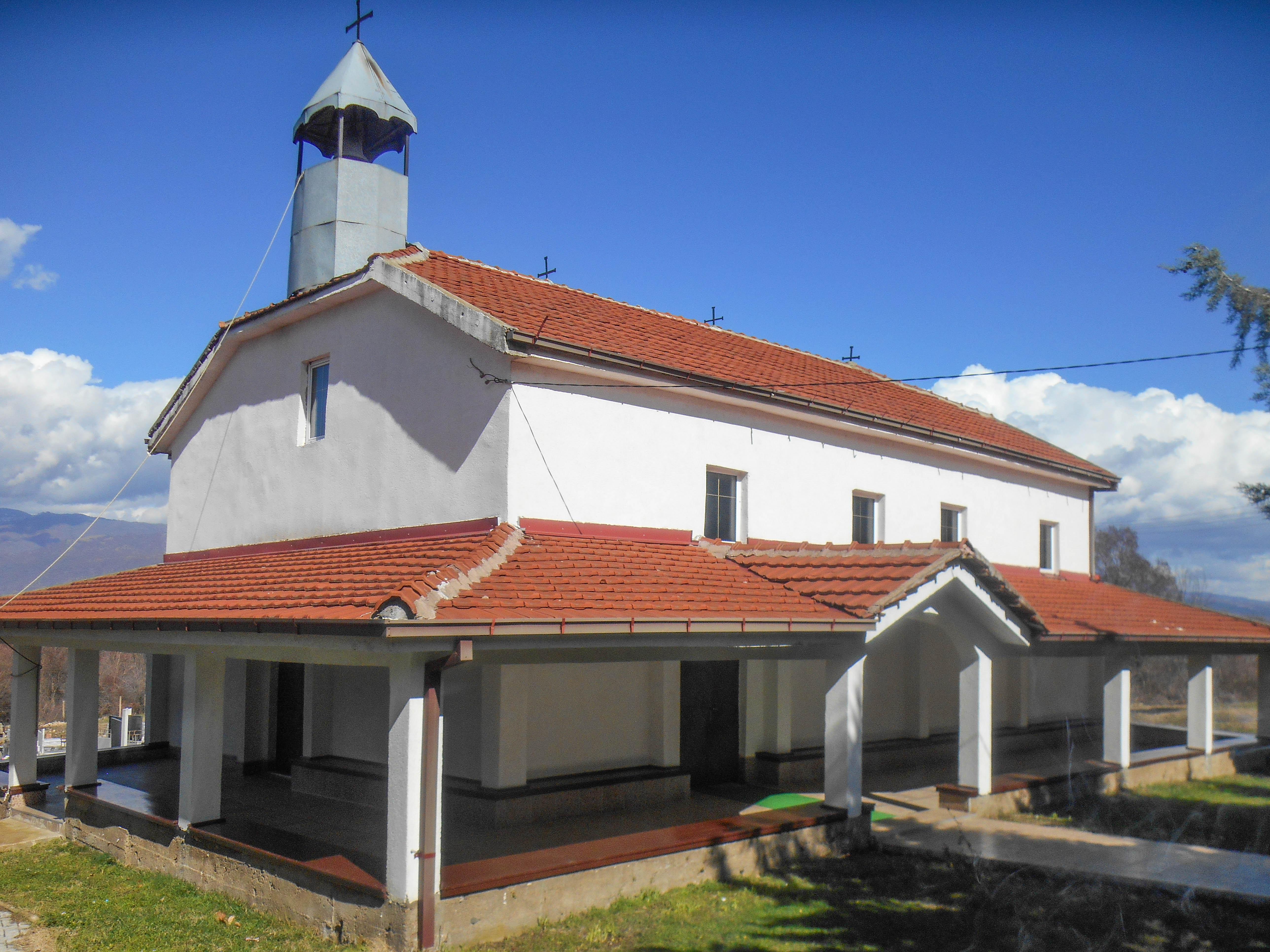 Црква „Св. Кирил и Методиј“ - Борисово